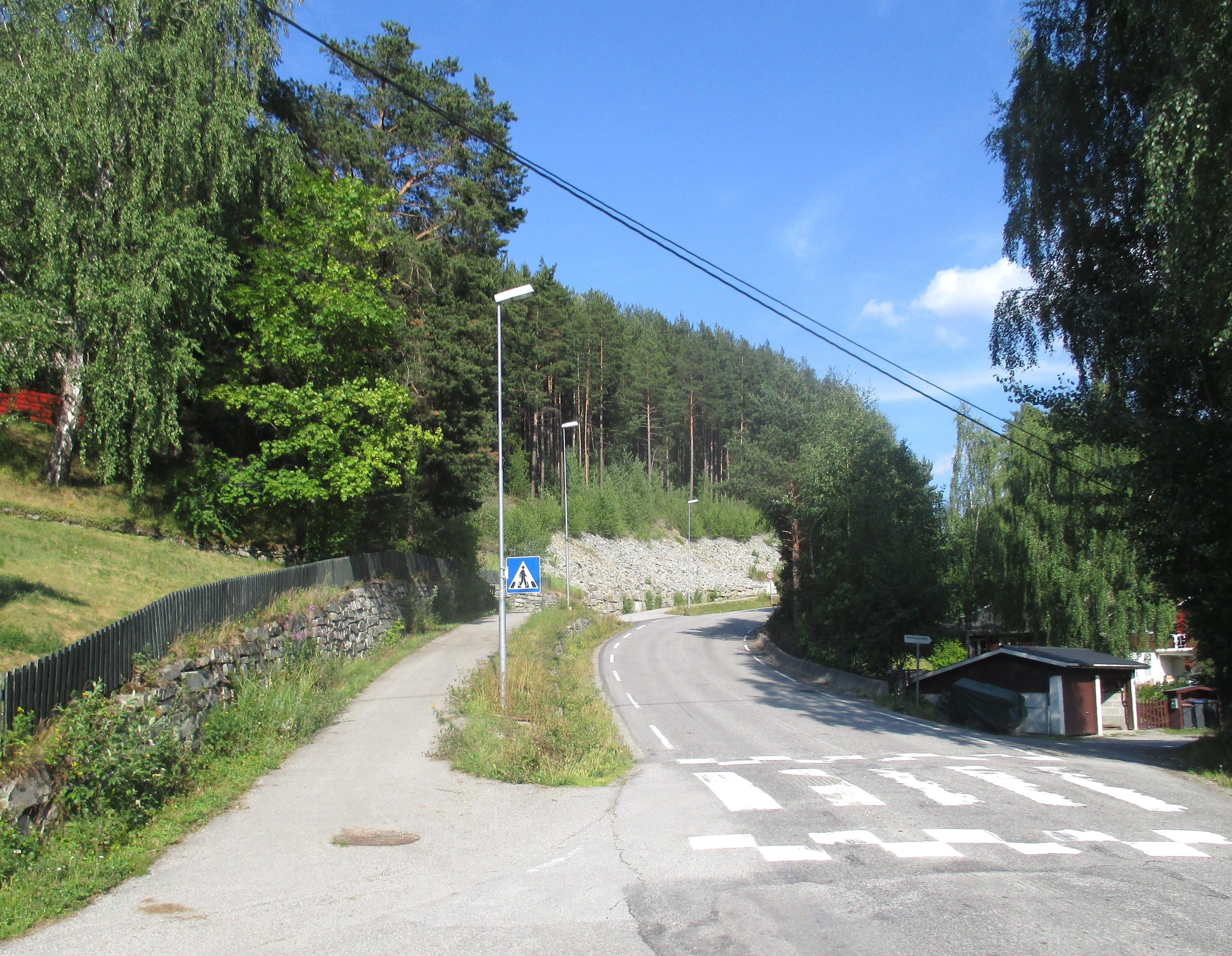 Fylkesvei 421 (Per Gynts seterveg) i Sødorp på Vinstra